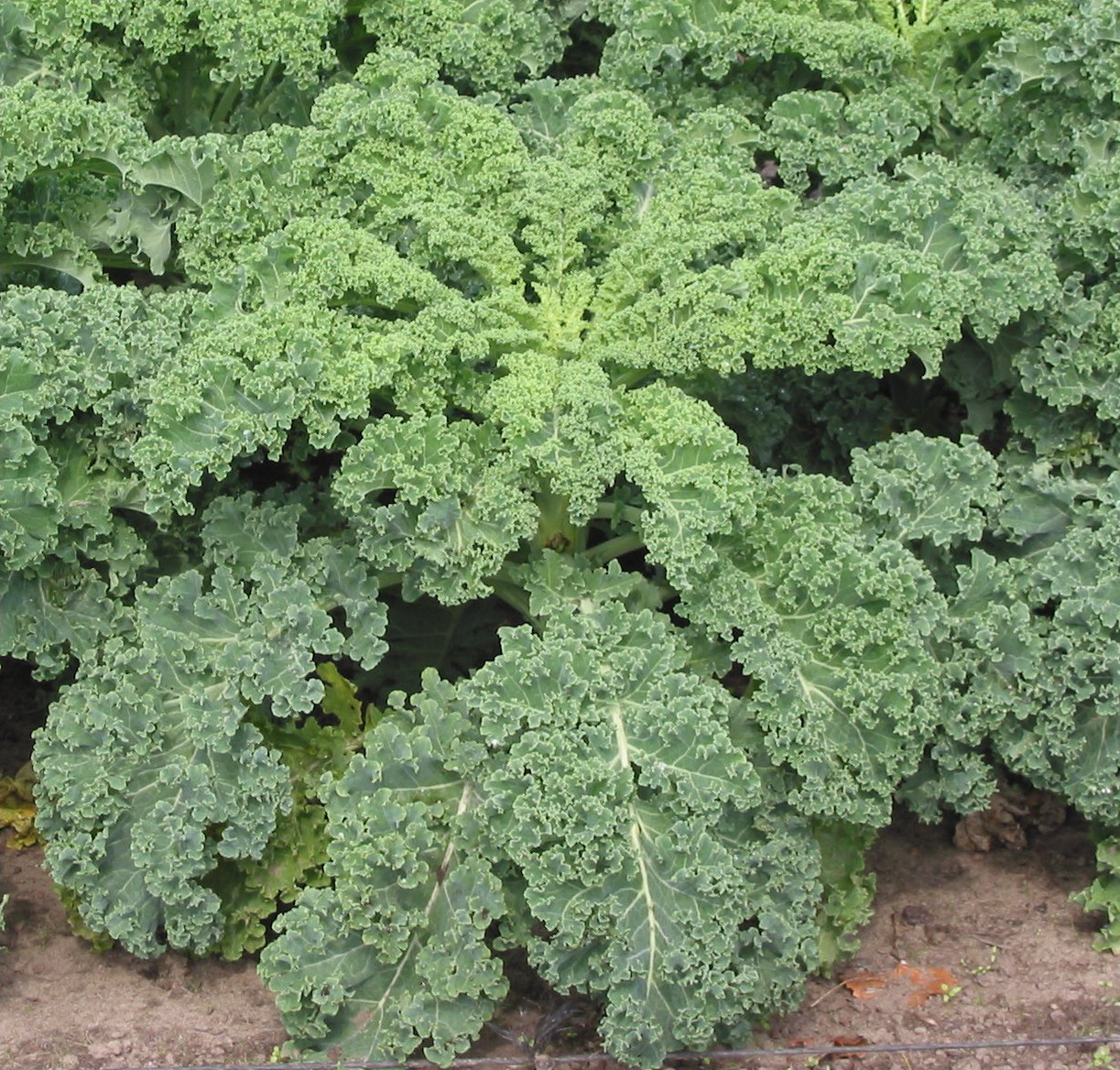 Curly kale (Boerenkool)